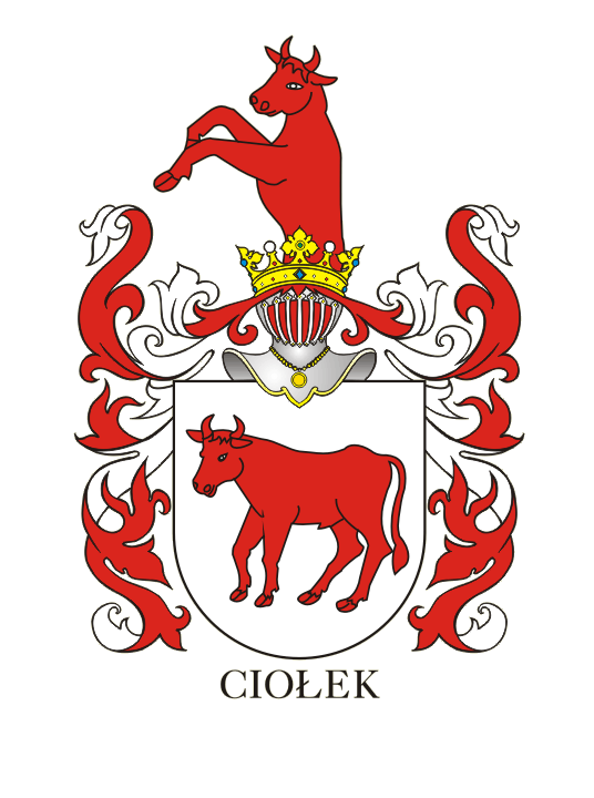 Poniatowski Familienwappen, aus Siebmachers Wappenbuch (1895) Scan: Benutzer:Alexvonf, 15.02.05